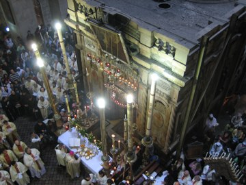 The Holy Seapulchre Church, Jerusalem. Catholic Holy Mass on Maundy Thursday / Crkva Svetoga groba u Jeruzalemu. Katolička sveta misa na Veliki četvrtak.